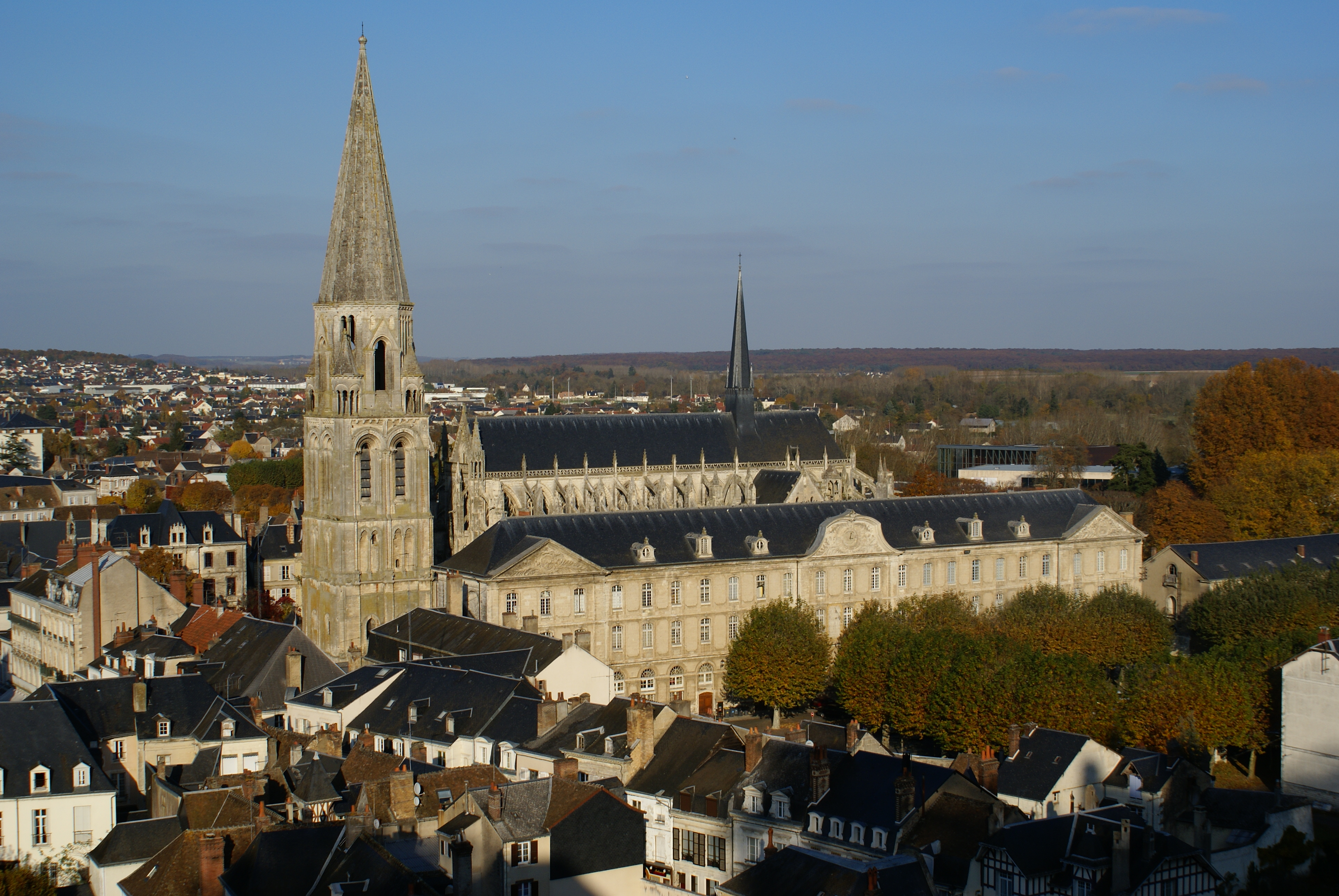 This building is en partie classé, en partie inscrit au titre des Monuments Historiques. .